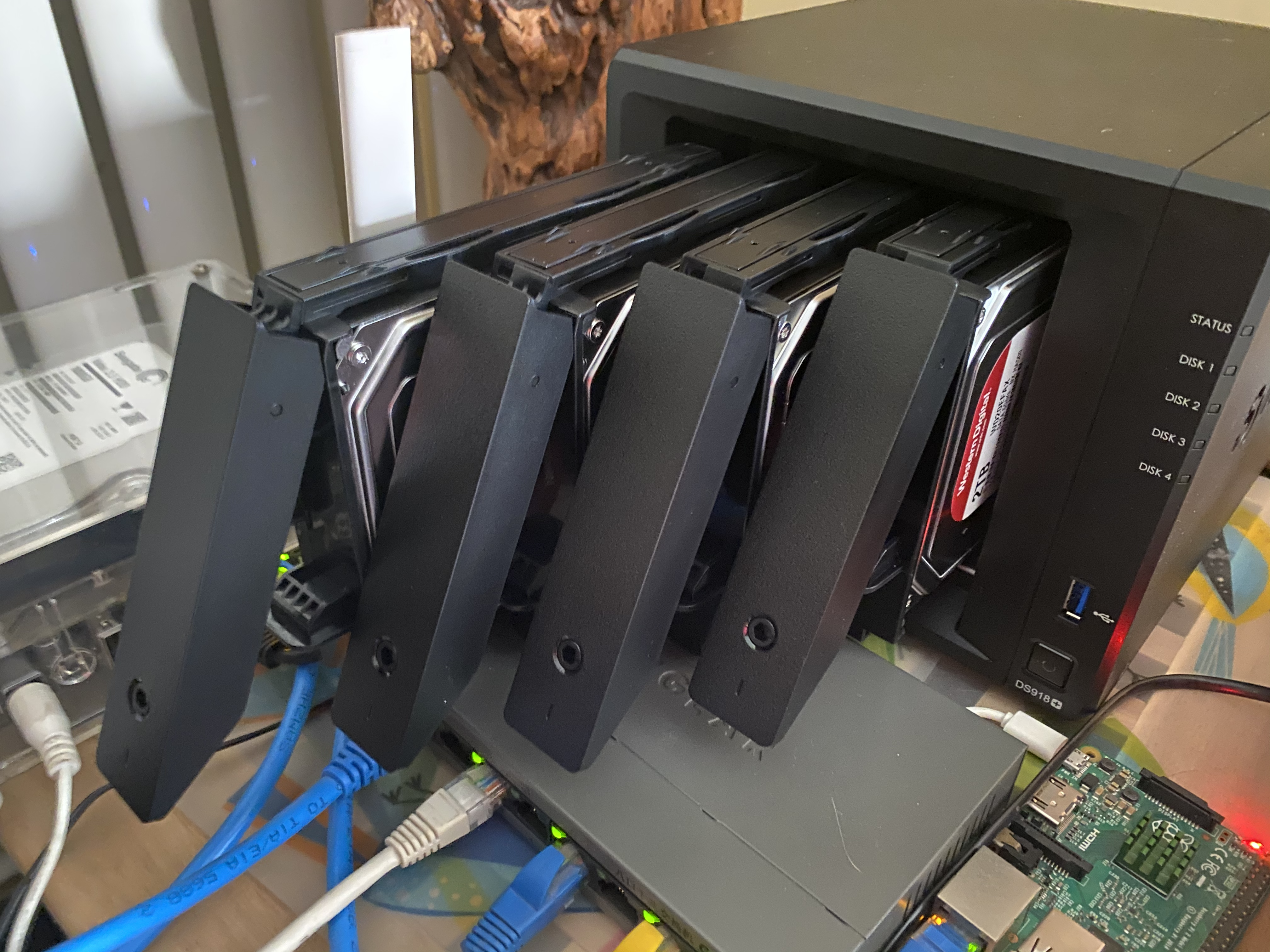 中文（中国大陆）: 安装完毕的Synology DS918+ 使用4块WD RED 2TB硬盘